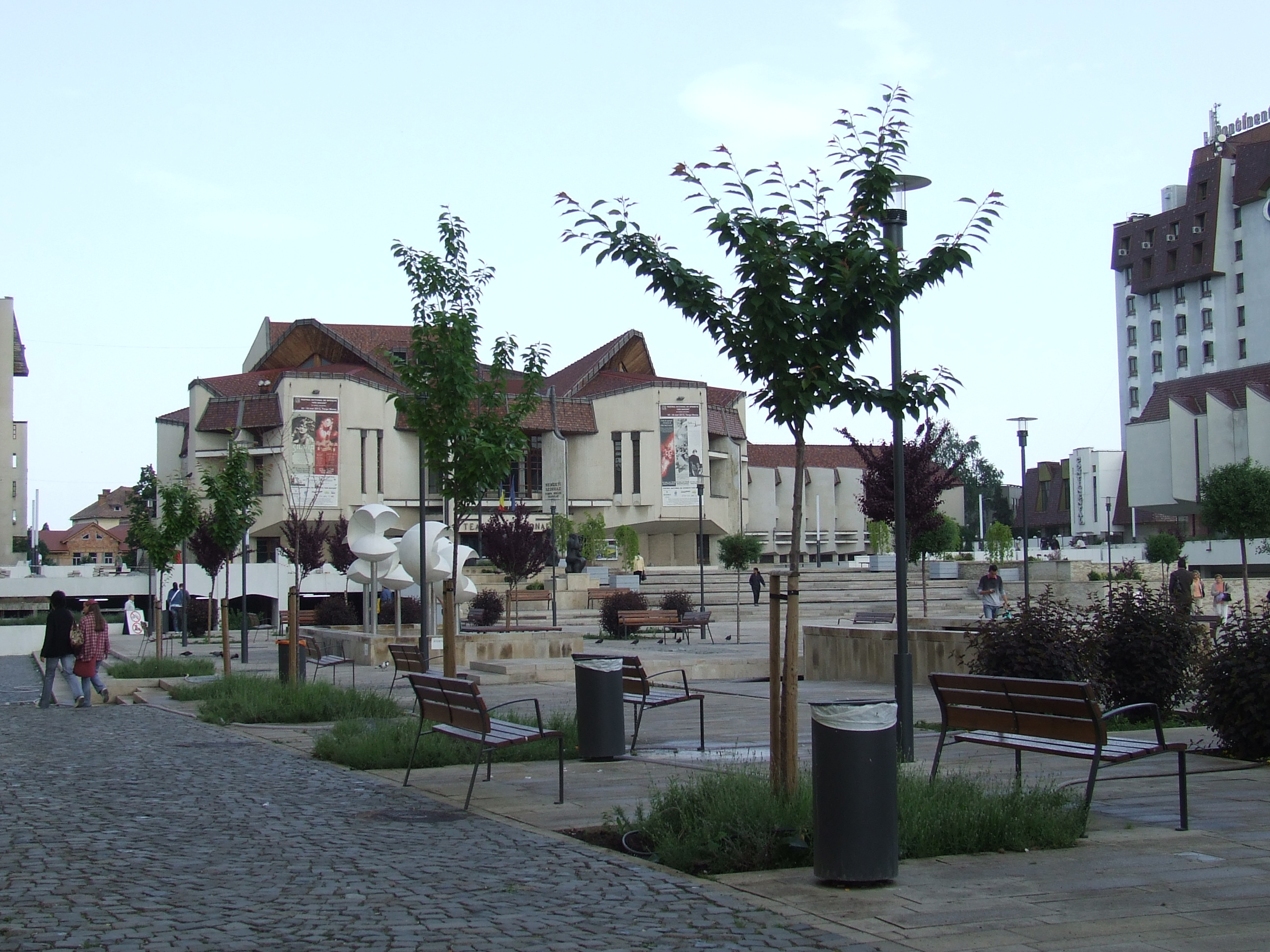 Marosvásárhely, Nemzeti Színház